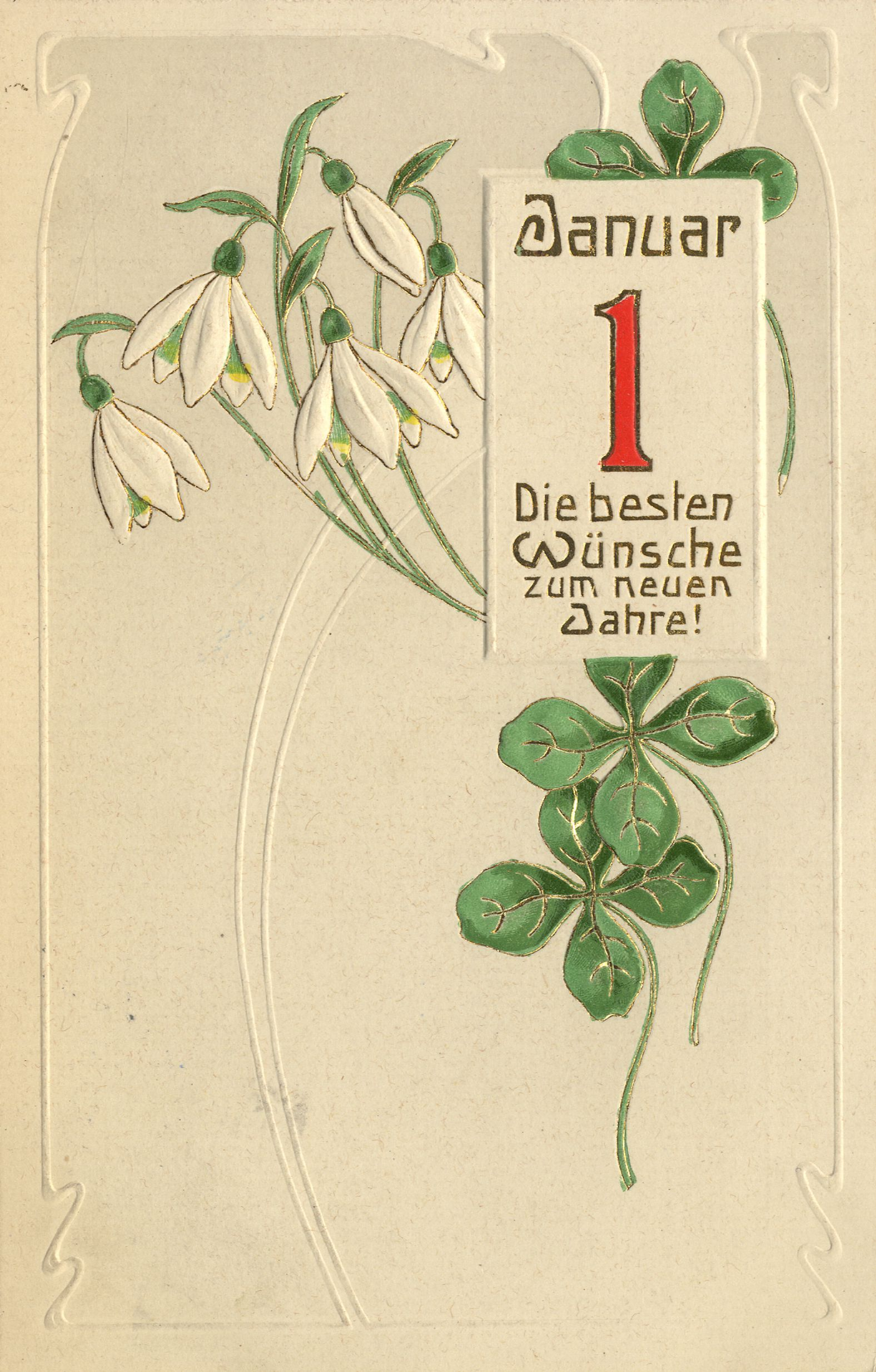 Postkarte